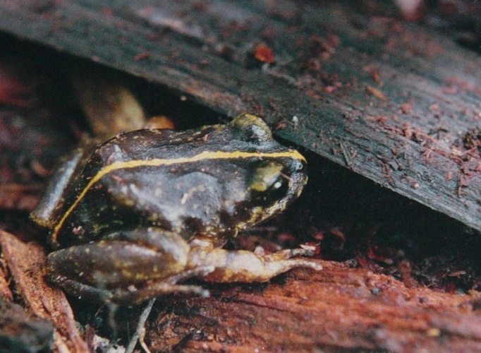 Eupsophus emiliopugini.